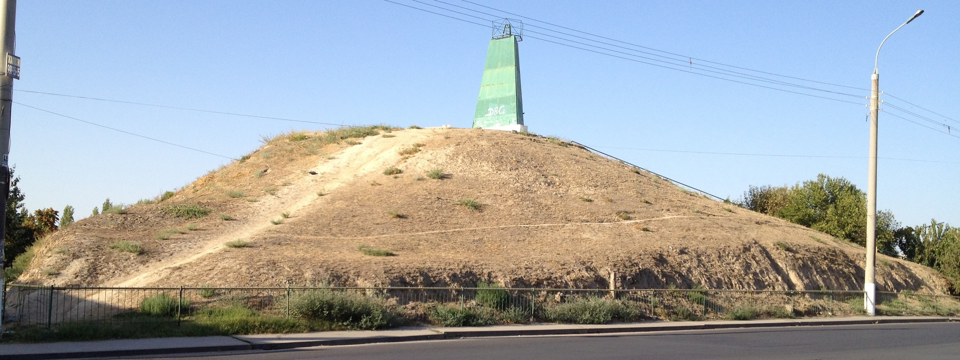 Городище Актепа Чагатай в Ташкенте, вид с юга Oʻzbekcha/ўзбекча: Chig`atoy Oqtepasi harobasi (Toshkent), janubiy tomoni